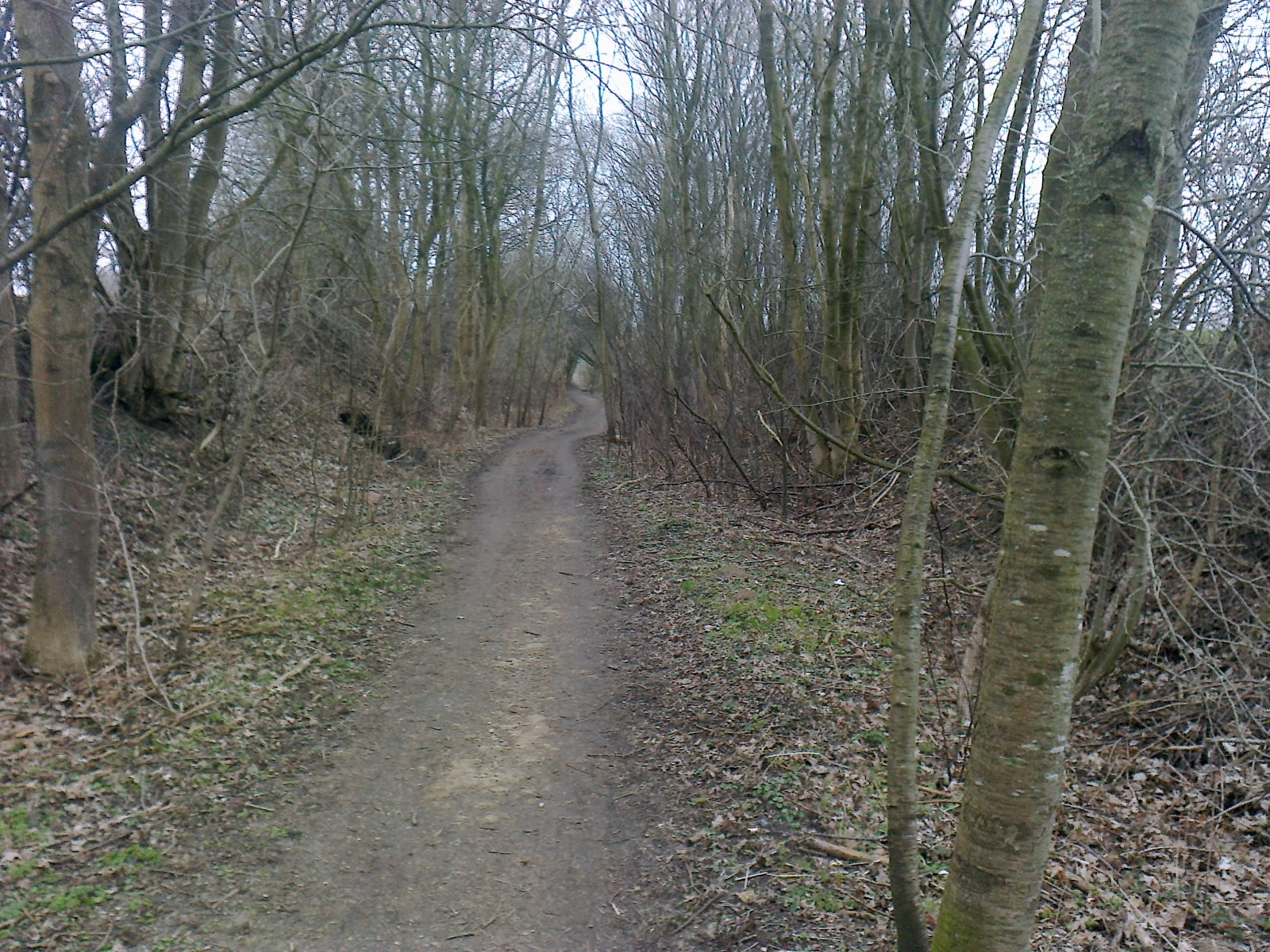 Kig bagud på vej til Povlinelund